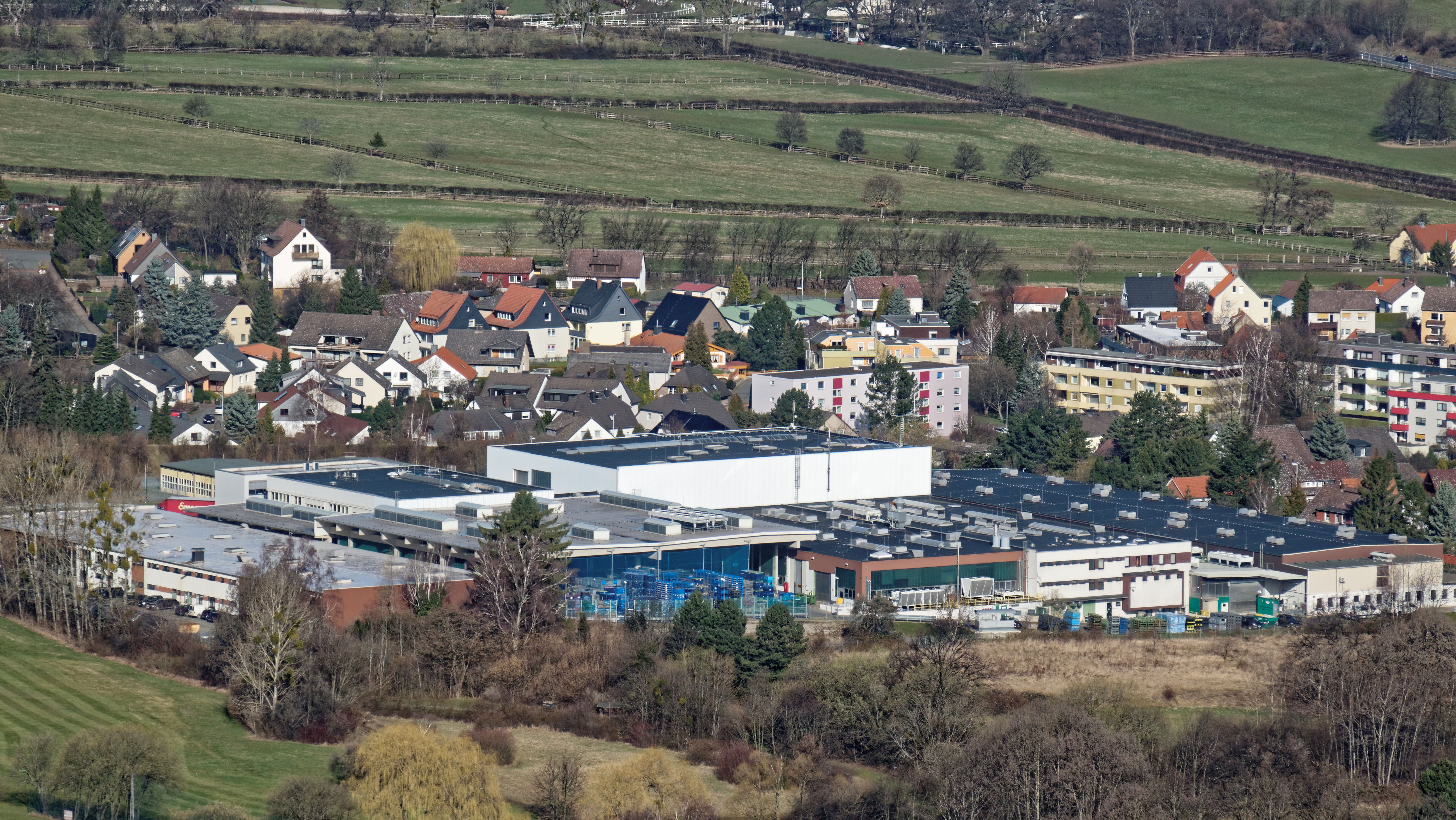 Blick vom Großen Burgberg auf das Mann+Hummel Werk in Bündheim